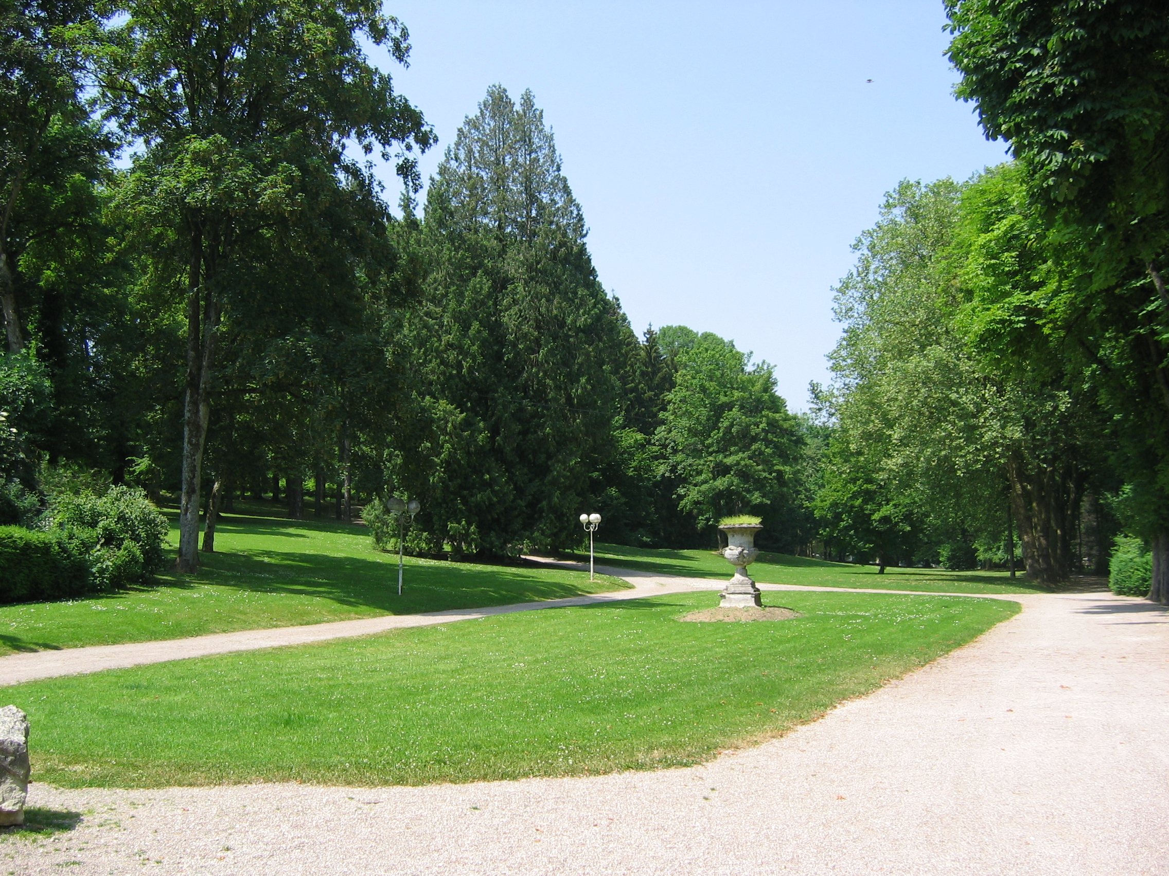 Parc thermal de Contrexéville, Vosges, Lorraine, France